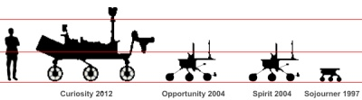 echelle comparative